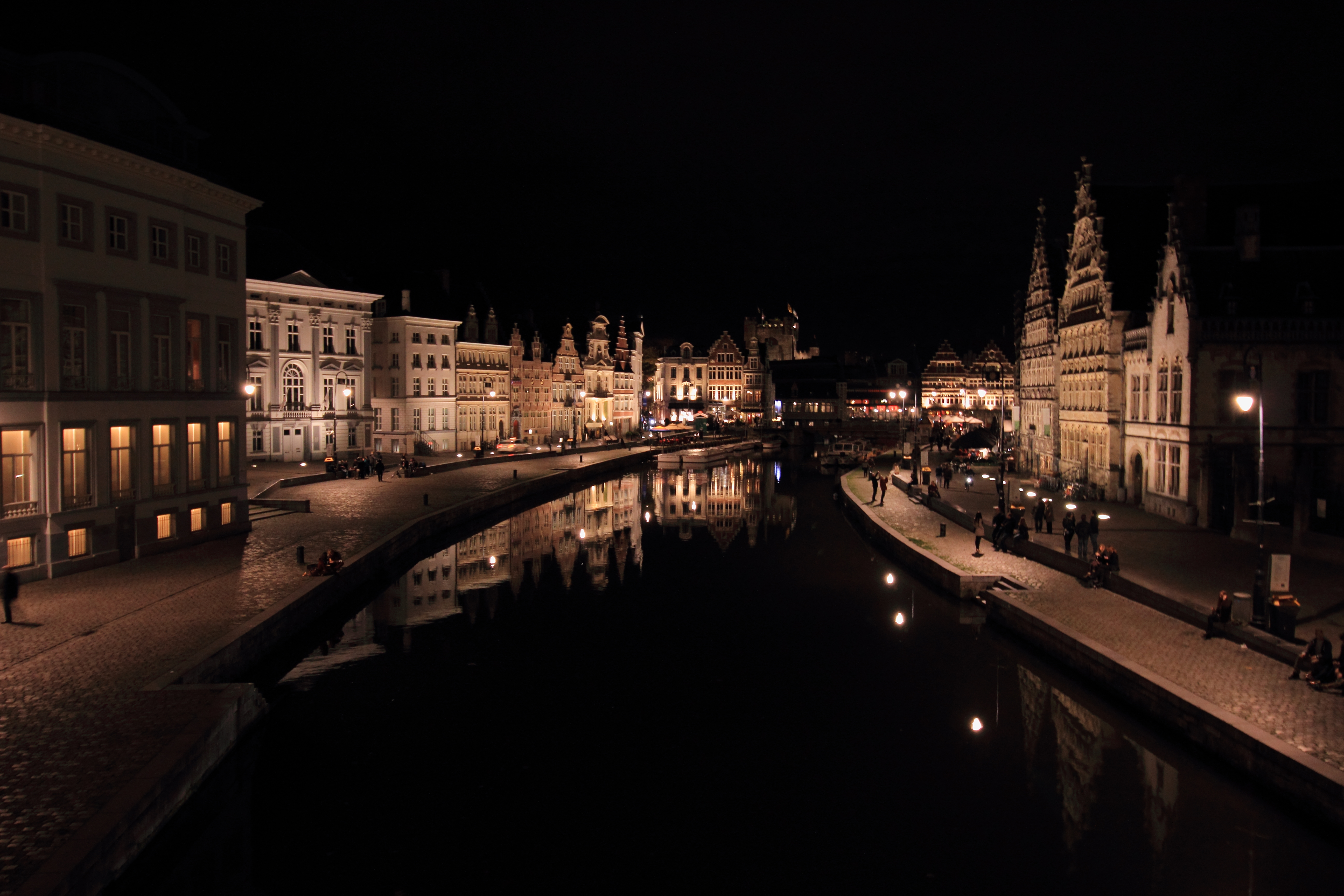 25 Ekim 2014 tarihinde St. Michael' s Köprüsü üzerinden çakilmiştir. Çağlar TÜRKMEN